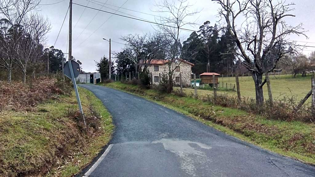 Vista de Bazón, Pedroso, Narón.